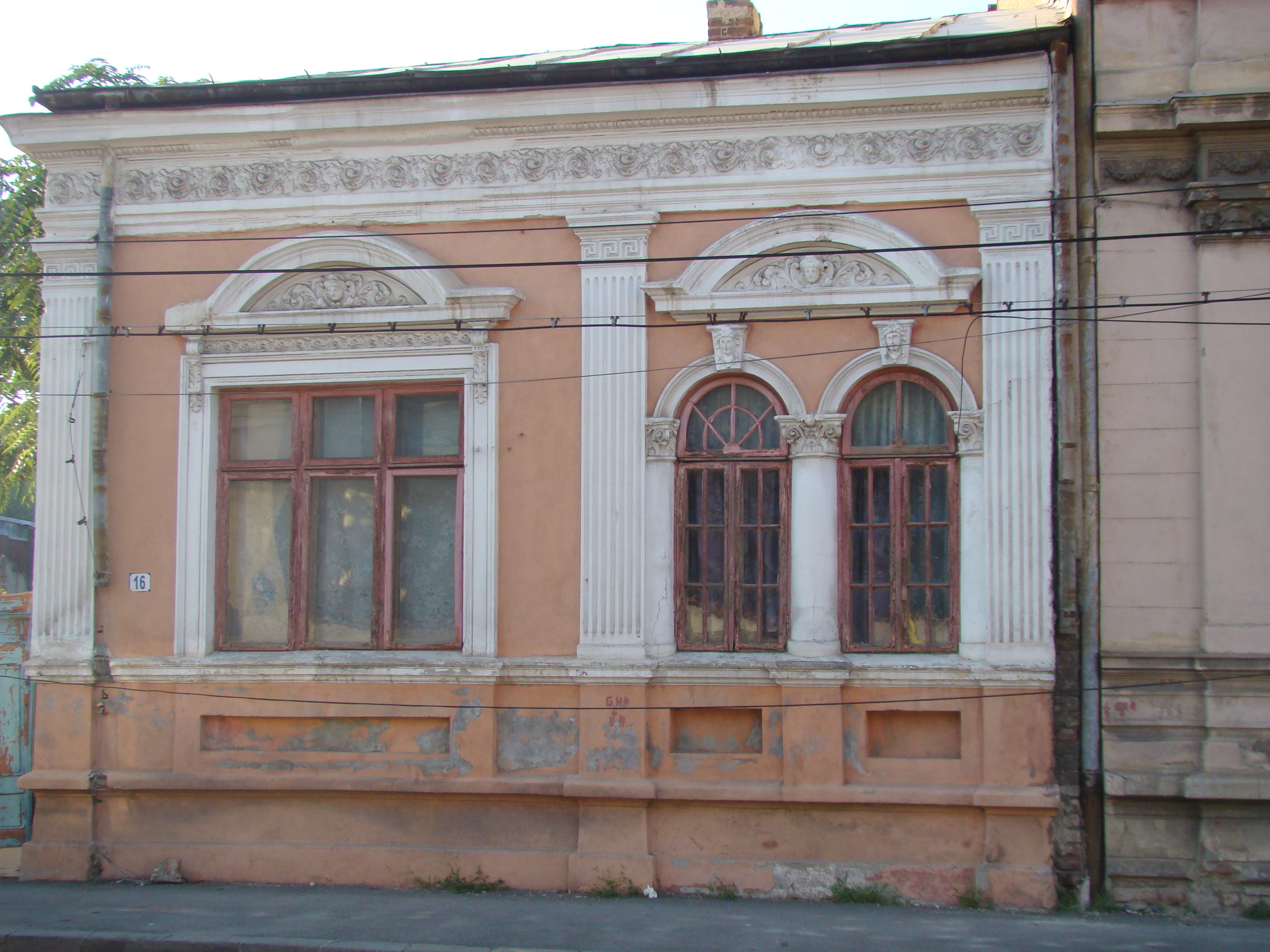 Clădire monument istoric, str. Mircea Vulcănescu, nr.16